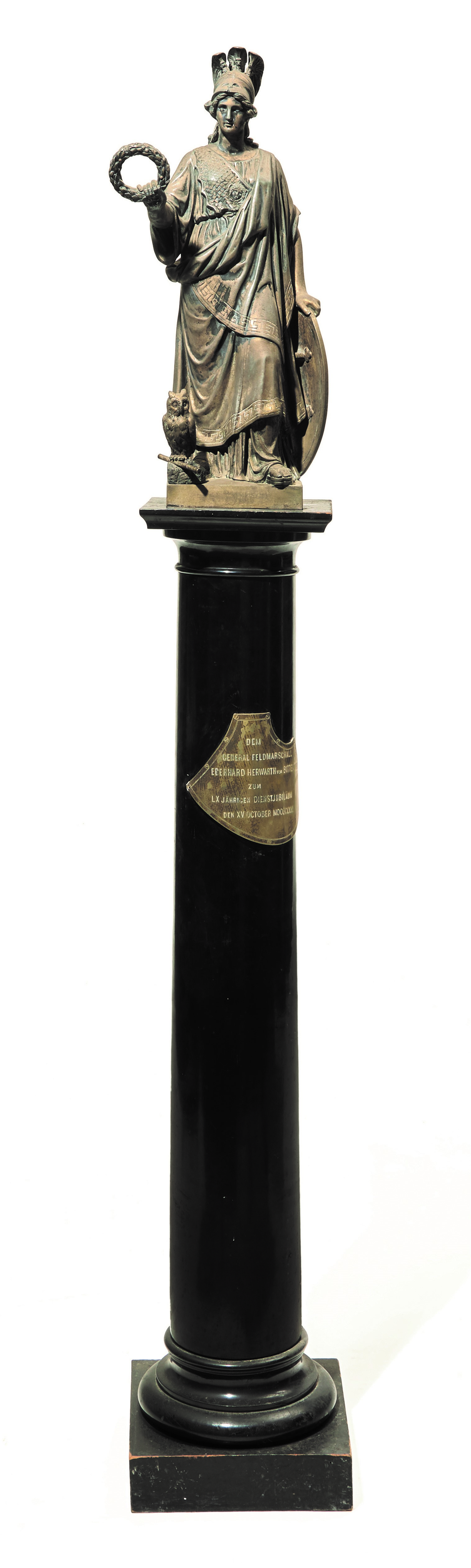 Statue der Pallas Athene auf einem Säulenpodest (19. Jahrhundert). Die Säule mit Widmung "Dem Generalfeldmarschall Eberhard Herwarth von Bittenfeld zum LX jährlichen Dienstjubiläum den XV October MDCCCLXXI (römische Zahlen in arabischen Zahlen: 60. jährliches Dienstjubiläum, 15. Oktober 1871). Die Säule in geschwärztem Holz. Die Figur in Zinkguss mit Resten von Versilberung. Widmung auf dem Schild der Pallas Athene: Befreiungskriege 1813,14,15 / Eroberung der Insel Alsen 1864 / Elb-Armee 1866 / Generalgouvernement am Rhein 1870/71. Höhe total 182 cm (die Figur 57 cm)